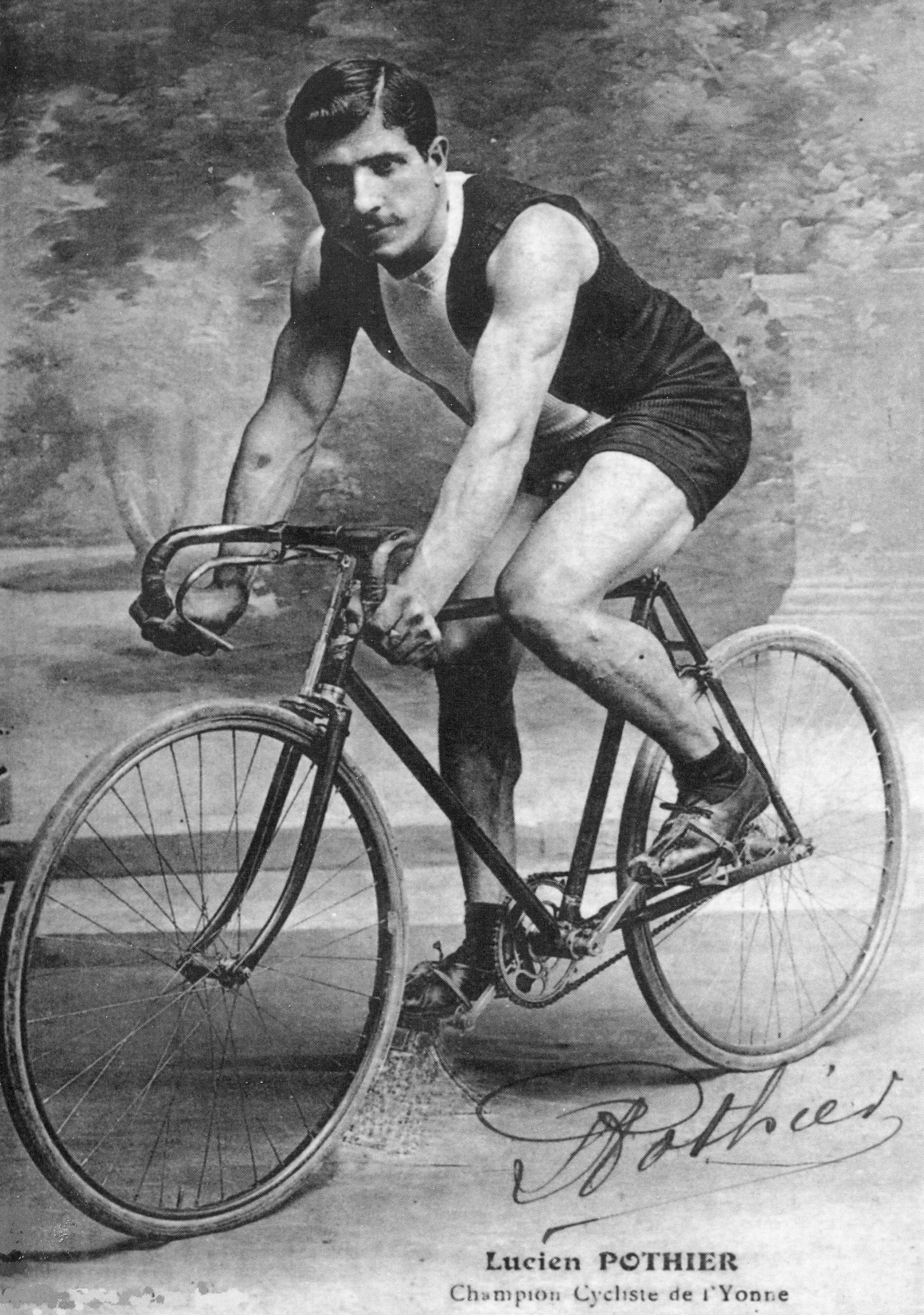 Lucien Pothier, amateur, certainement avant 1900